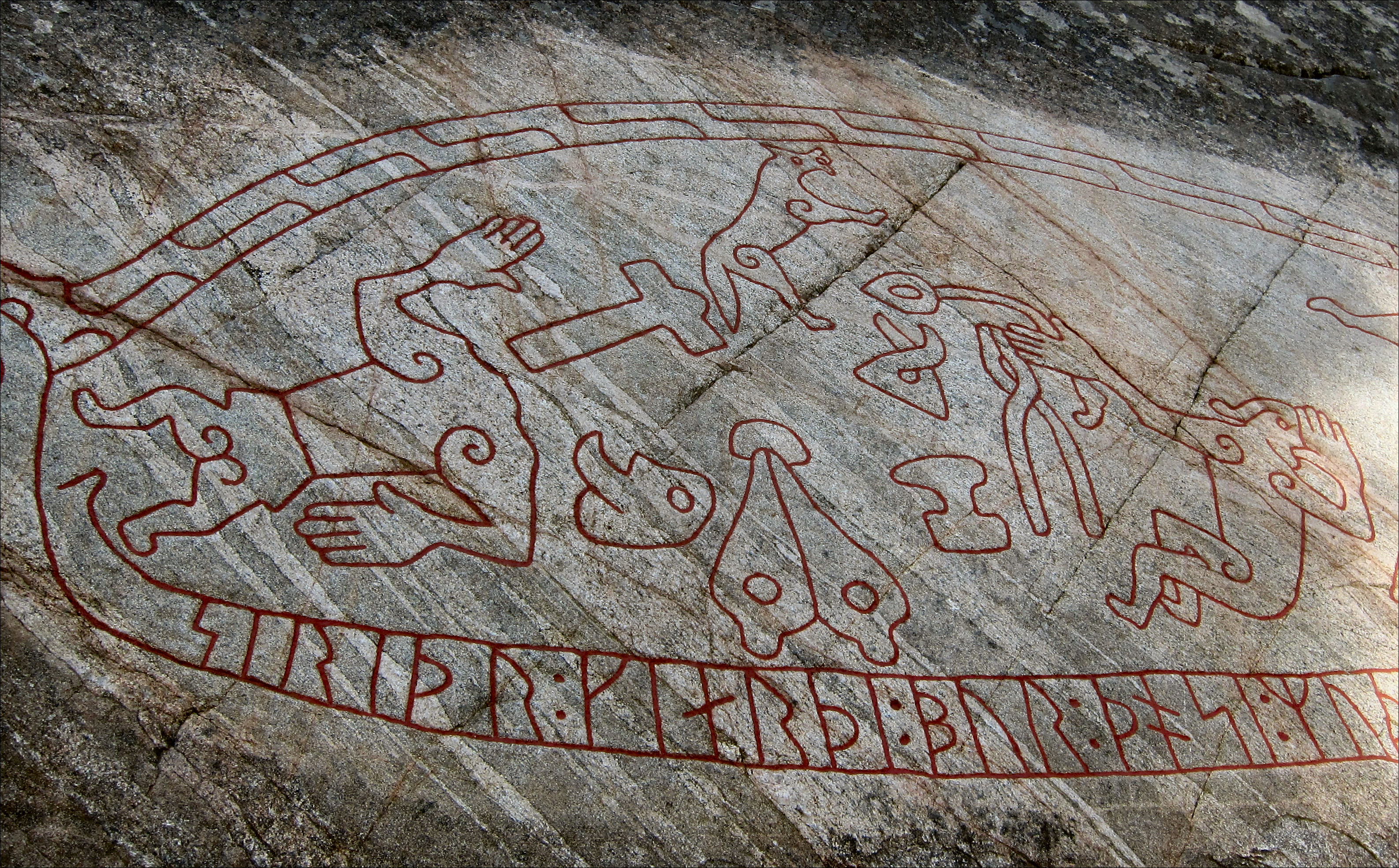 Sö 101/Sigurdsristningen